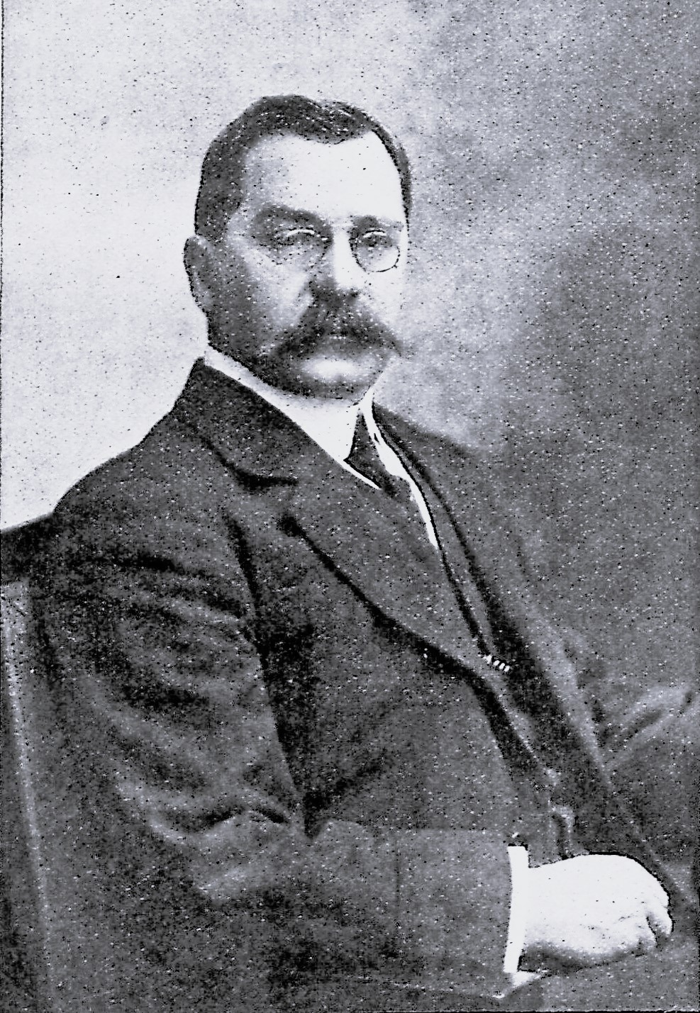 Konsul Adolf Ahlers wurde wegen Hochverratsverdacht zum Tode verurteilt.